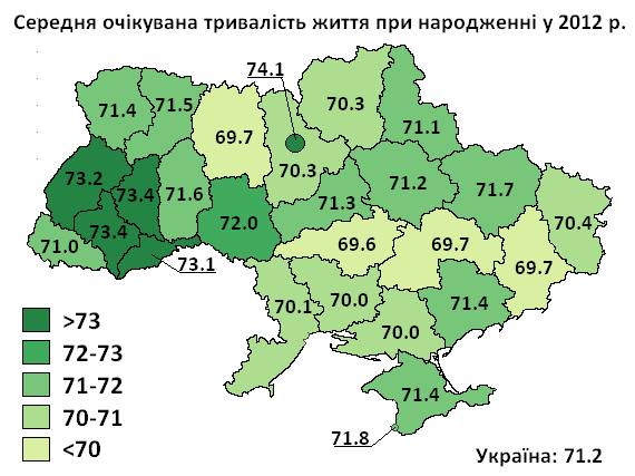 Тривалість життя при народженні у 2012 р. / Life expectancy at birth in Ukraine in 2012